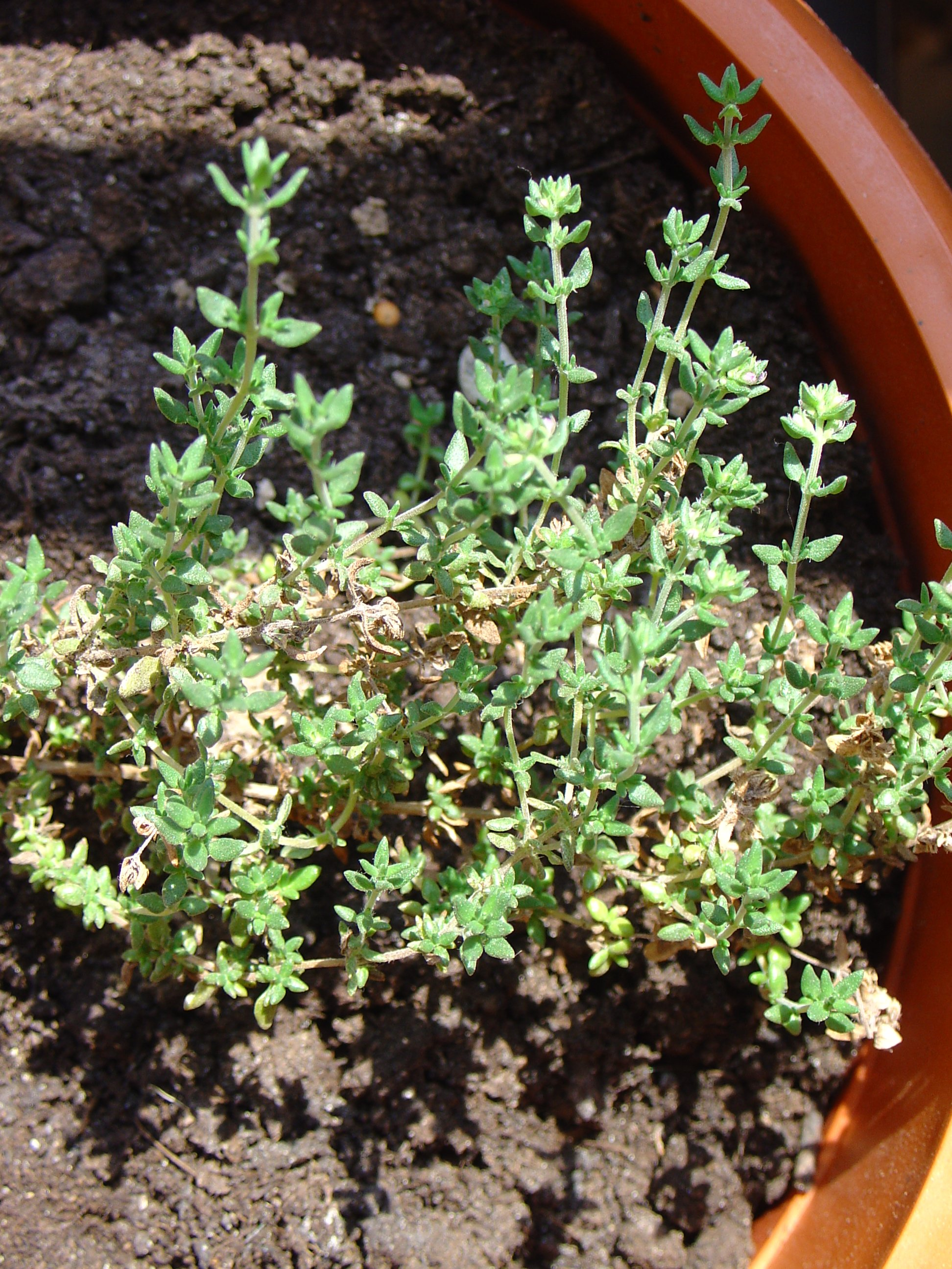 Thymus hyemalis, tomillo de invierno, sin flor, procendente de un vivero de Cartagena